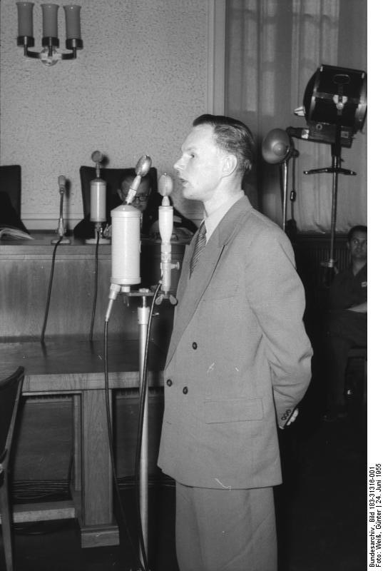 Zentralbild/Weiß 24.6.1955 Prozeß gegen Agenten vor dem Obersten Gericht Am 24.6.1955 begann vor dem Obersten Gericht der Deutschen Demokratischen Republik in Berlin ein Prozeß gegen fünf Angeklagte, die vom RIAS zur Agententätigkeit für Spionageorganisationen angeworben wurden. UBz:Der Angeklagte Joachim Wiebach. Er war Dekorateur bei der DEWAG.